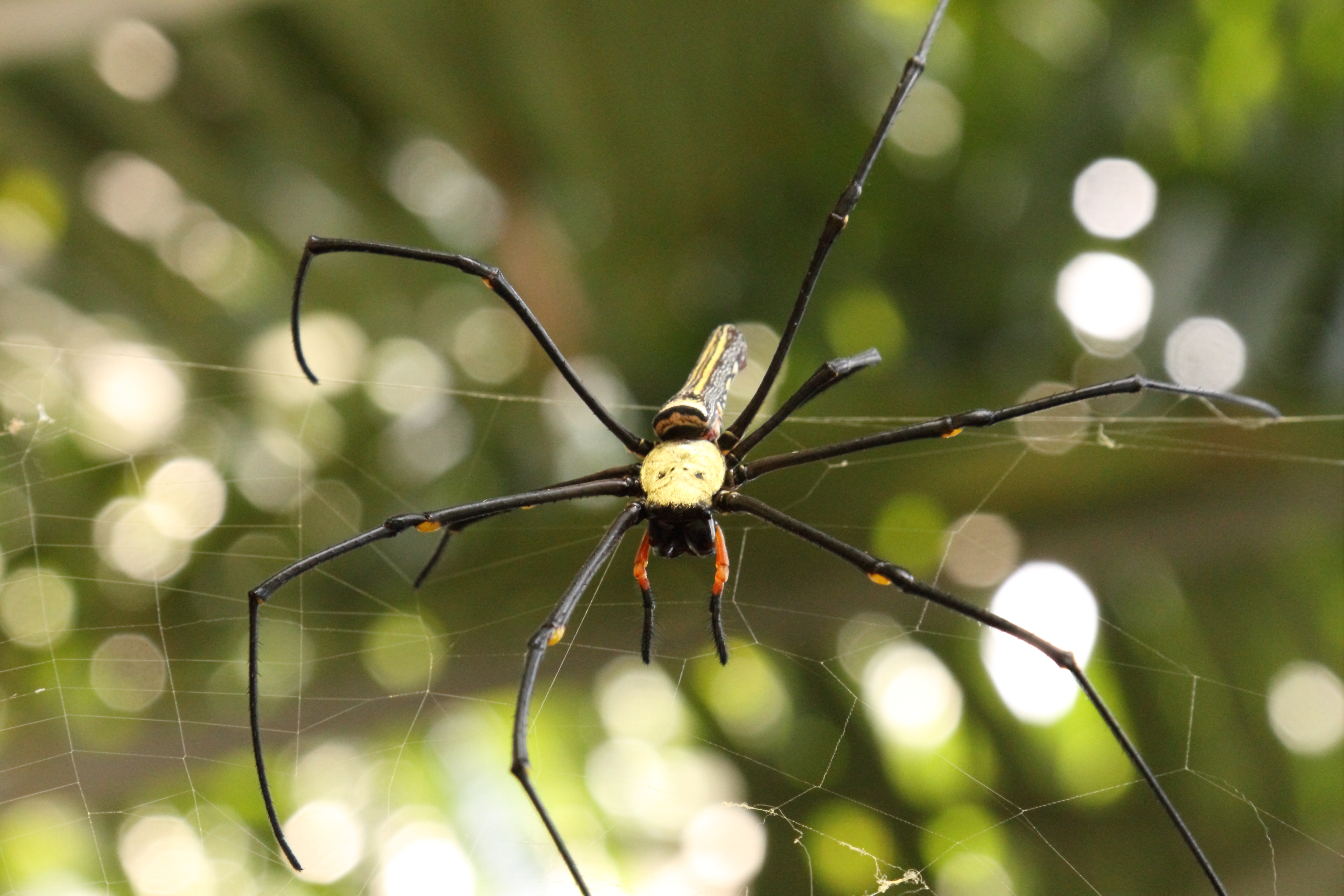 a golden-web spider (Nephila sp.)